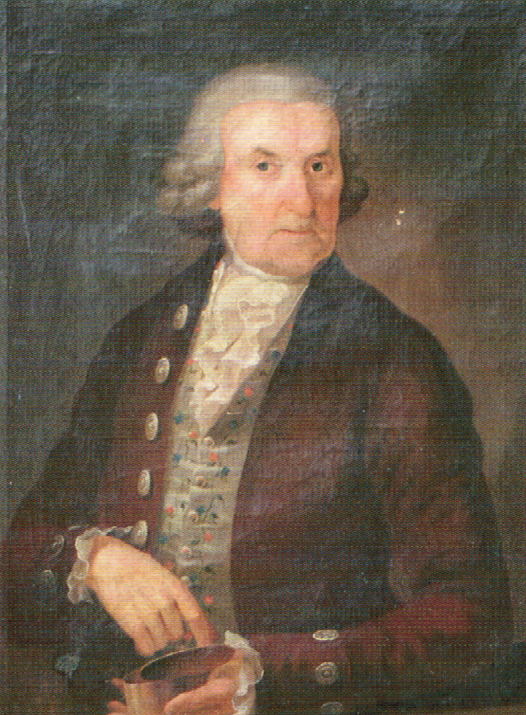 Philipp Balthasar Rosenmeyer (1714-1800), Kaufmann, Ratsherr und Bürgermeister in Warburg